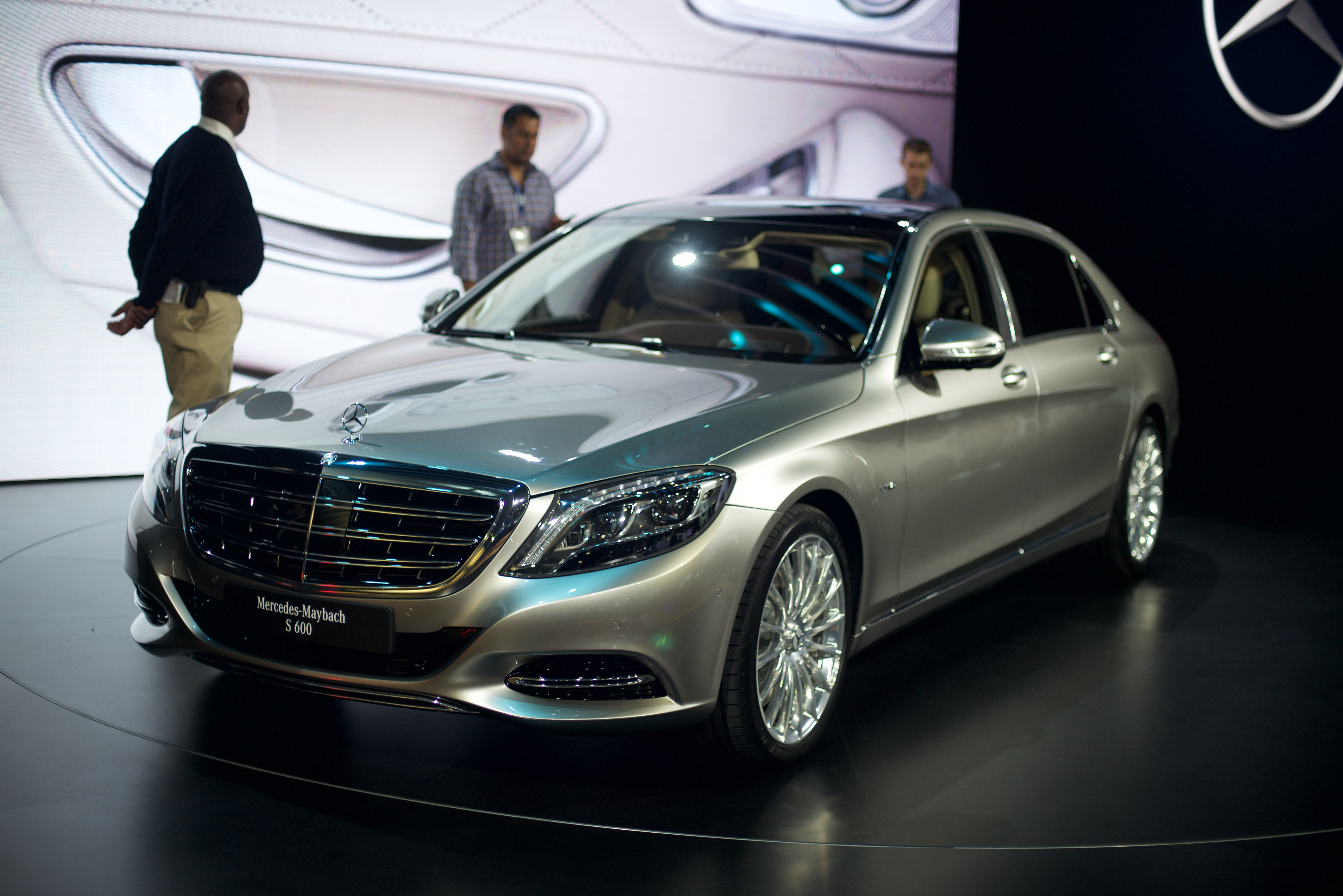 SLY_5710